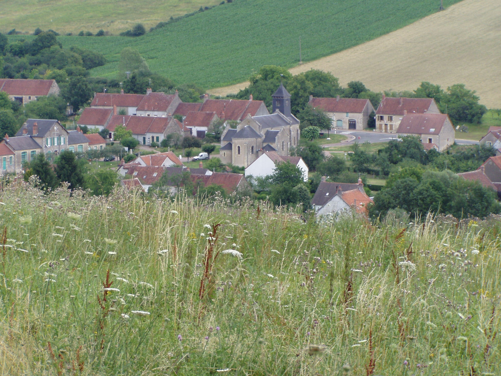 Vue générale de Nannay (Nièvre).